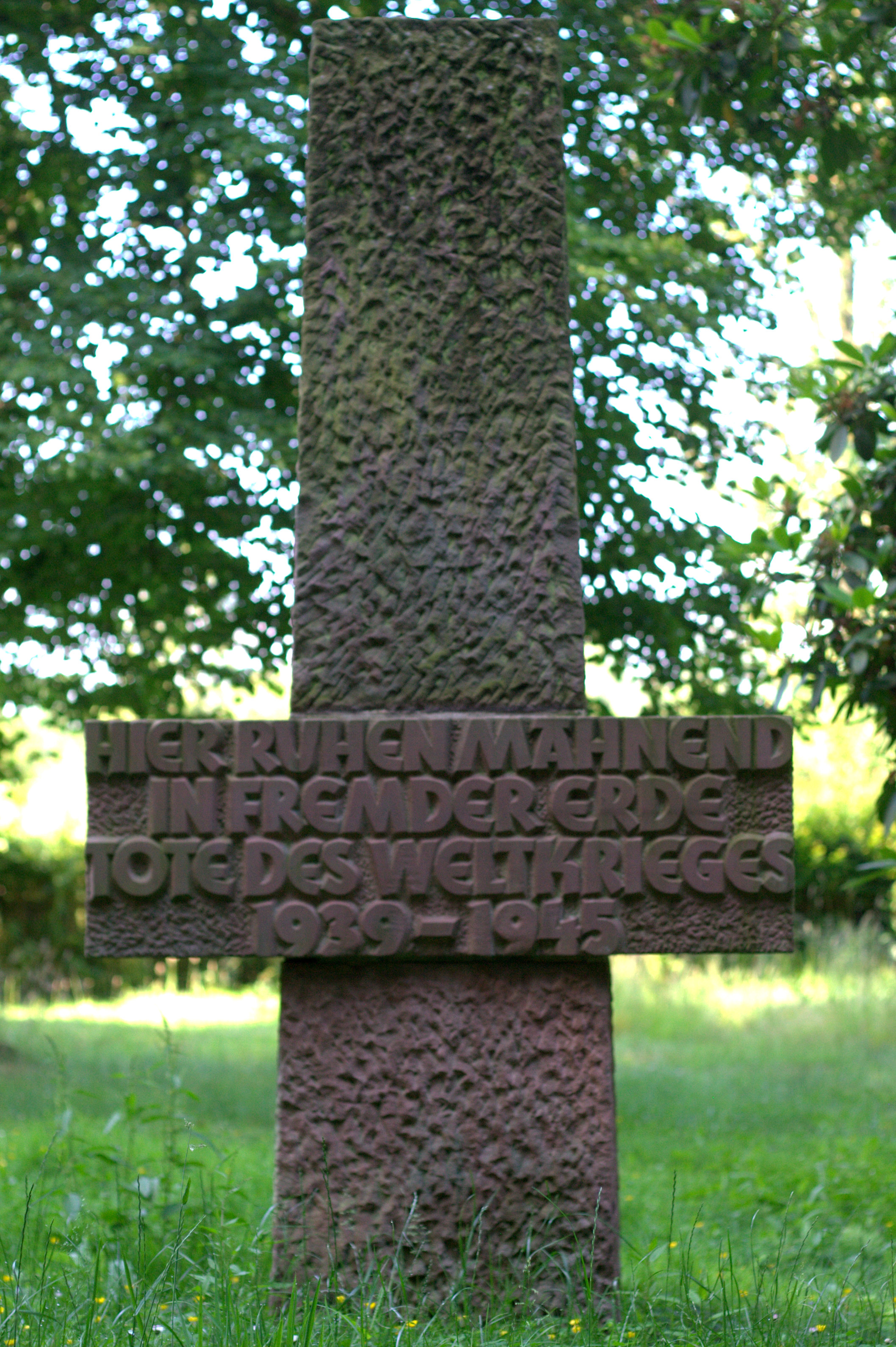 Gedenktafeln für die Ehrung der verstorbenen des Kriegsgefangenenlagers Stalag IX A Ziegenhain